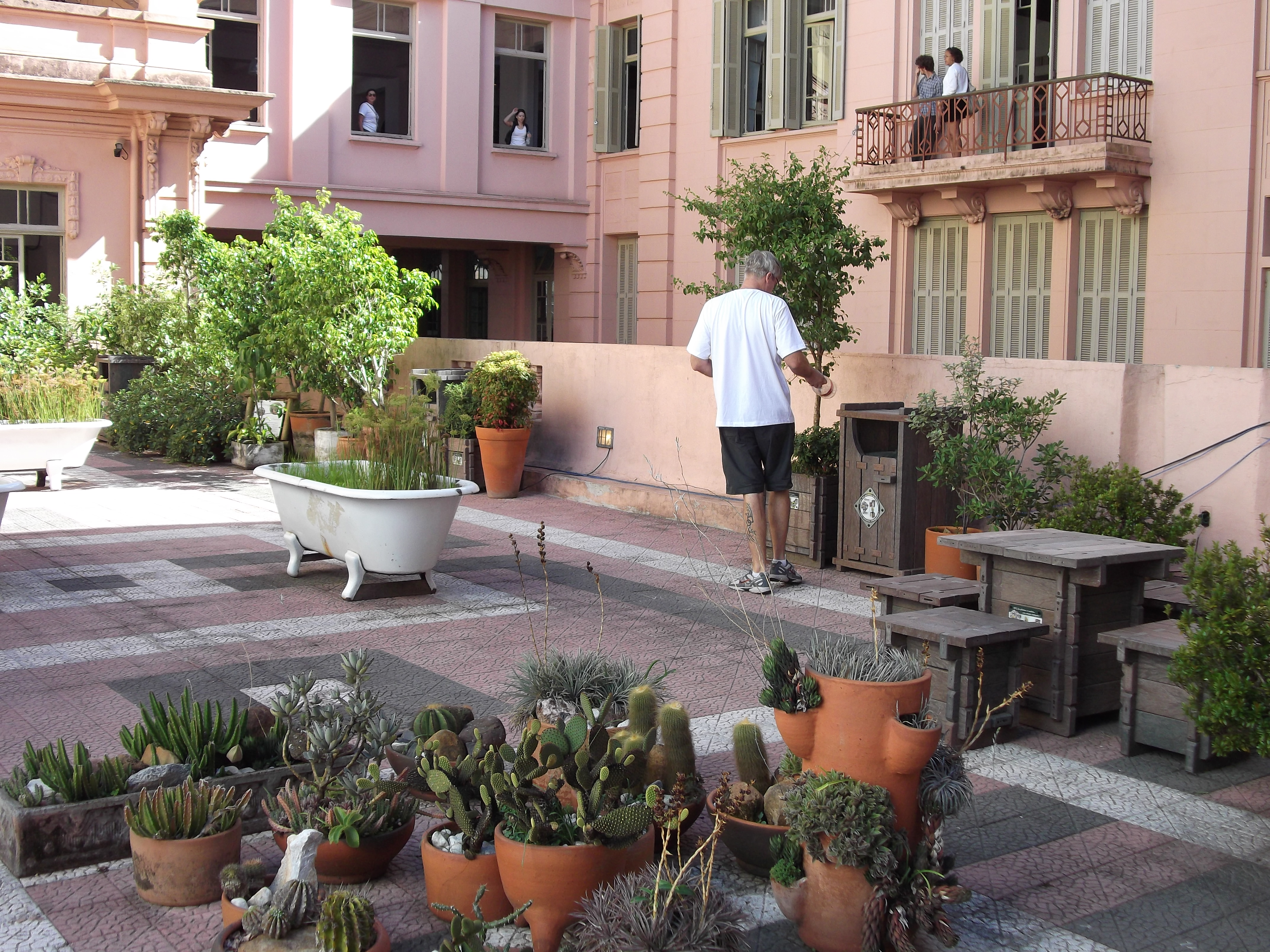 Casa de Cultura Mario Quintana - Jardim Jose Lutzenberger